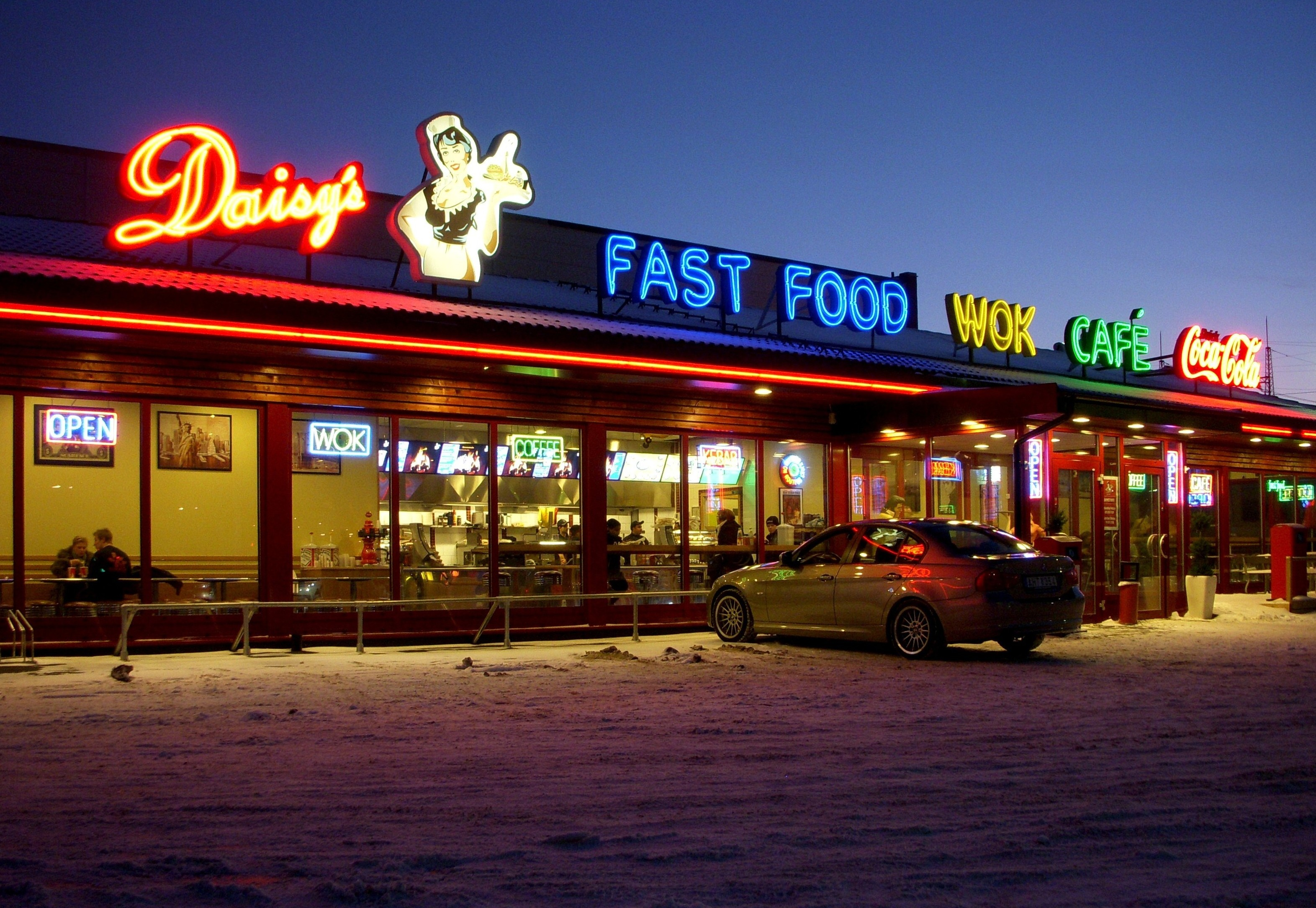 Neonreklam för "Daisy's fastfood" i Stockholm